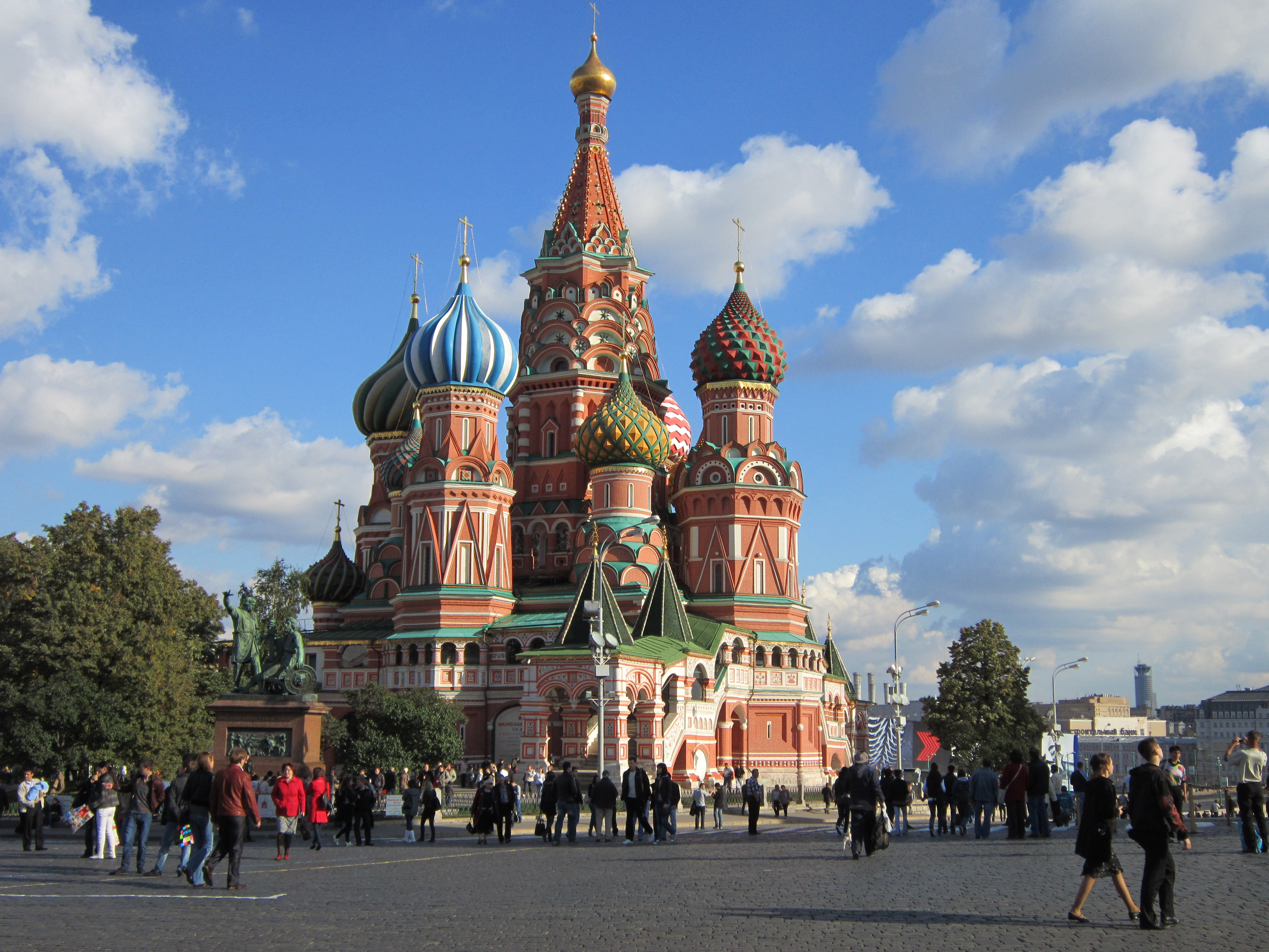 Cathédrale Saint-Basile